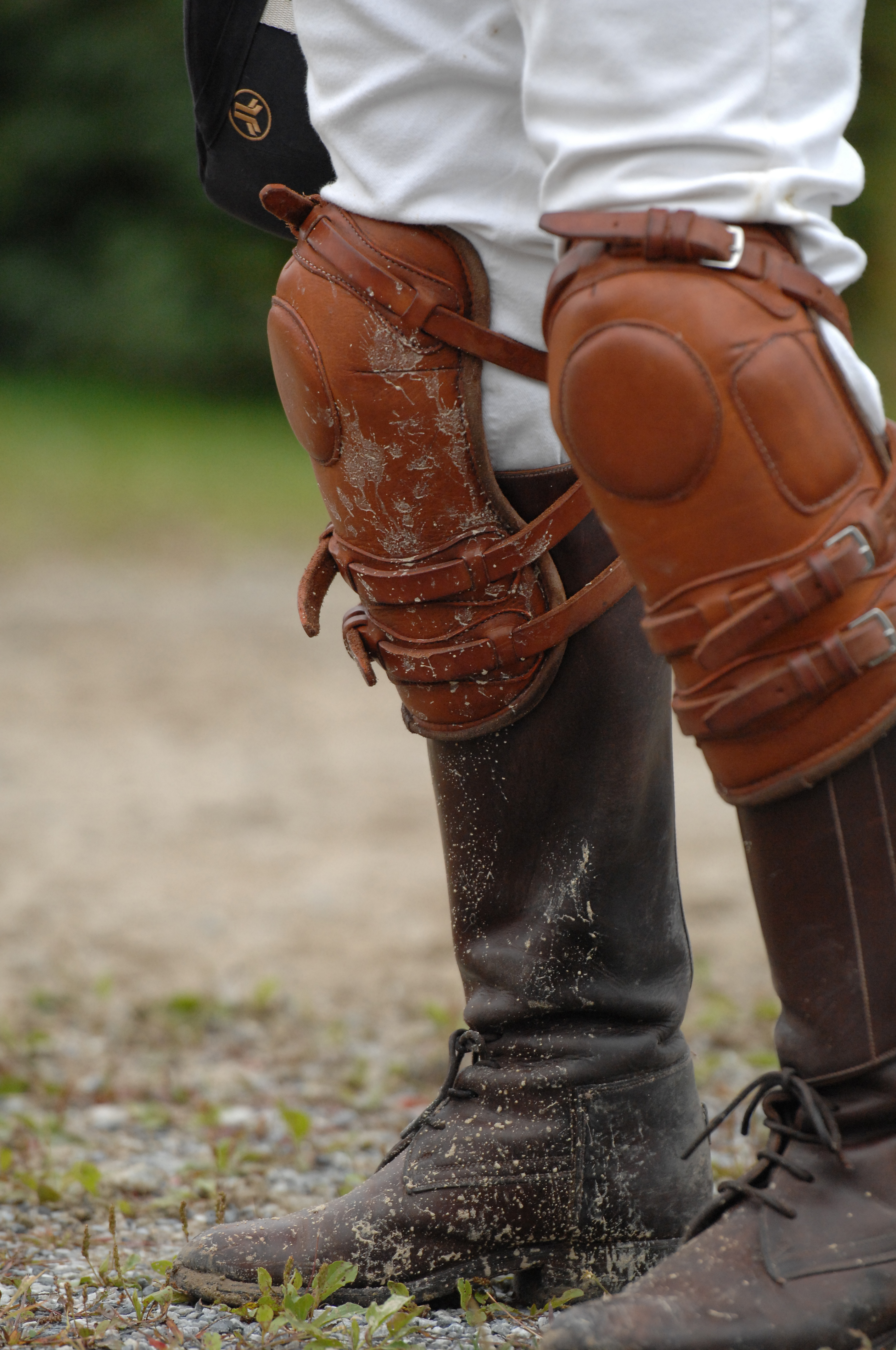 Polo kneepads